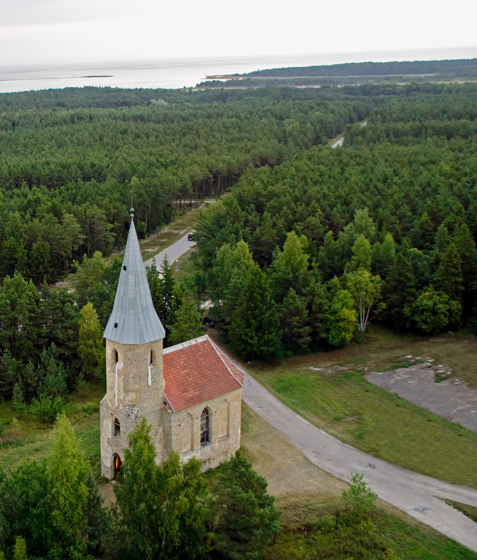 Paluküla kirik. Vaade ülevalt